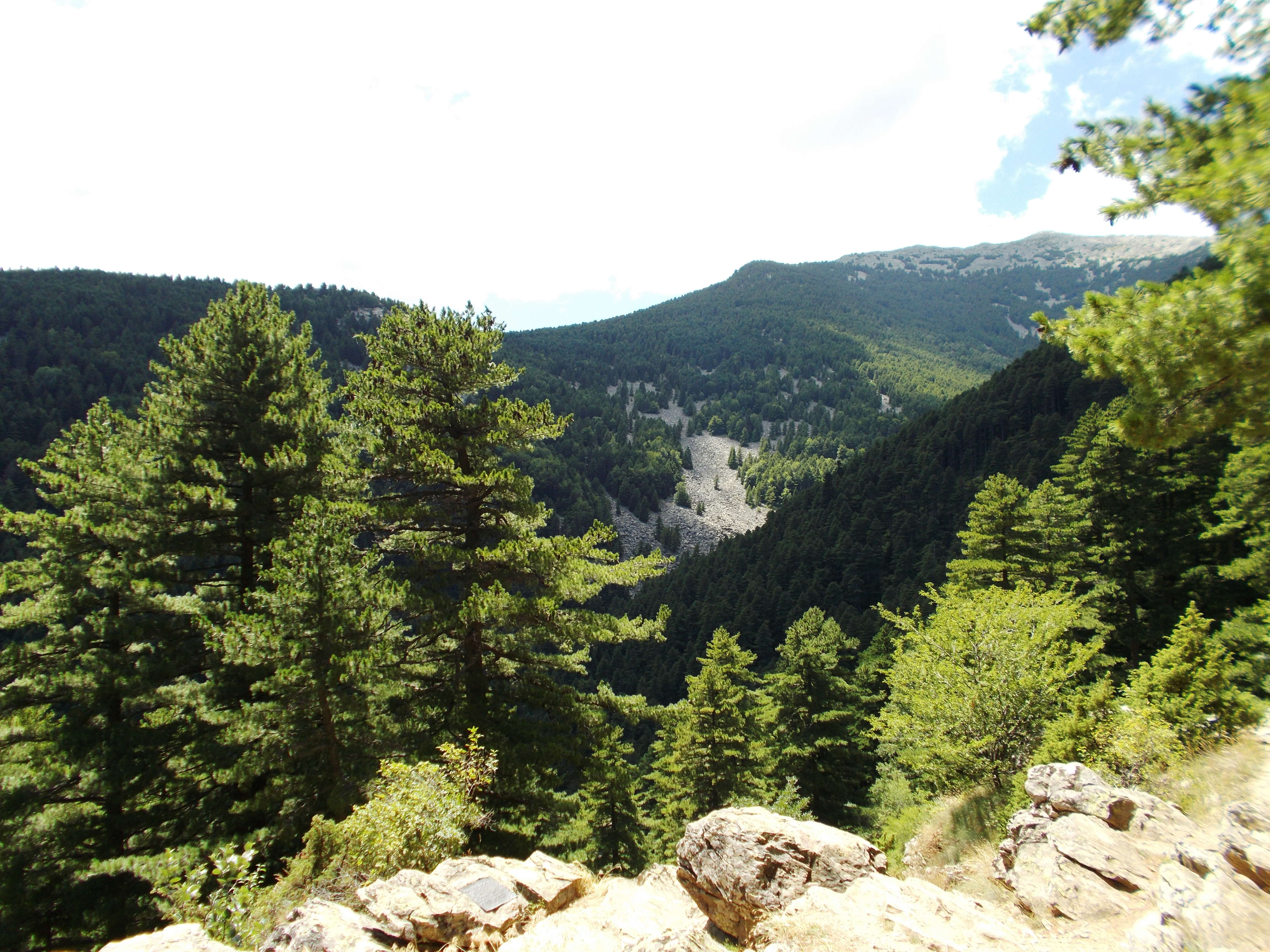 Молика на Пелистер.